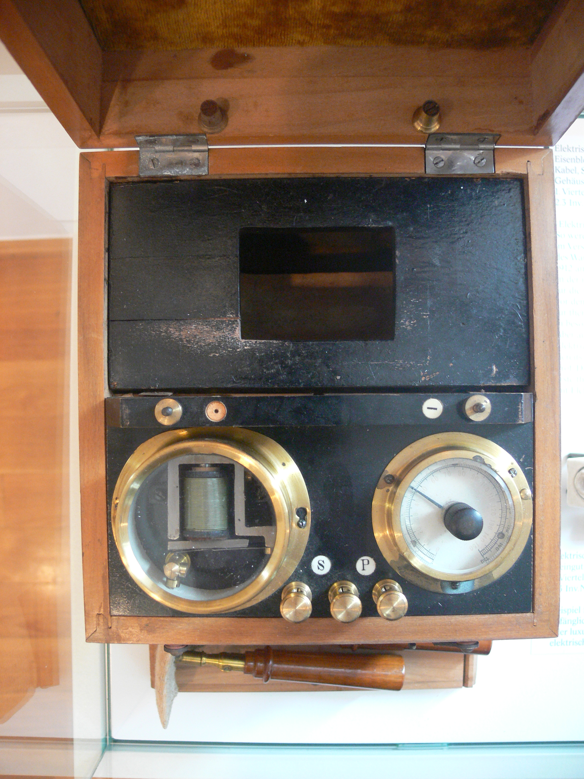 Elektrisierapparat für therapeutische Zwecke, 1. Viertel 20. Jh. Landesmuseum Württemberg (Außenstelle Museum für Volkskultur in Württemberg, Waldenbuch) 2.3., Inv. Nr. VK 1989/460